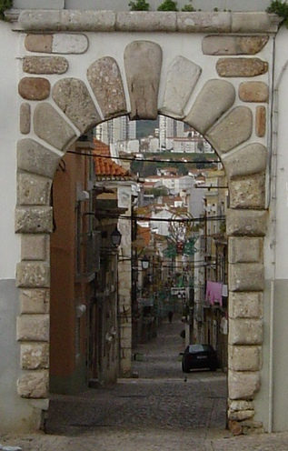 Muralha de Setúbal Porta de S. Sebastião